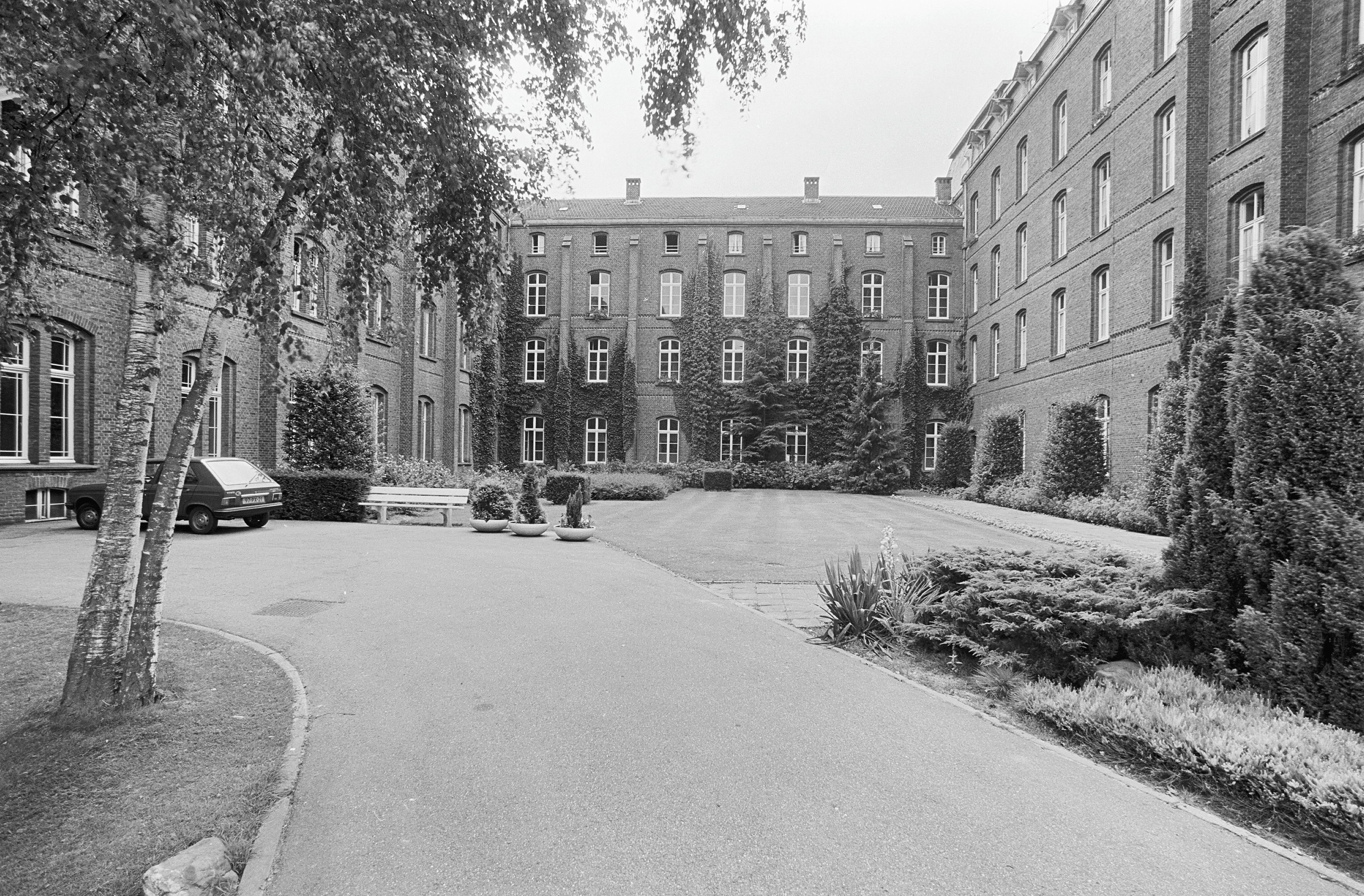 Voormalig Jezuietenklooster / Huize Boslust: overzicht